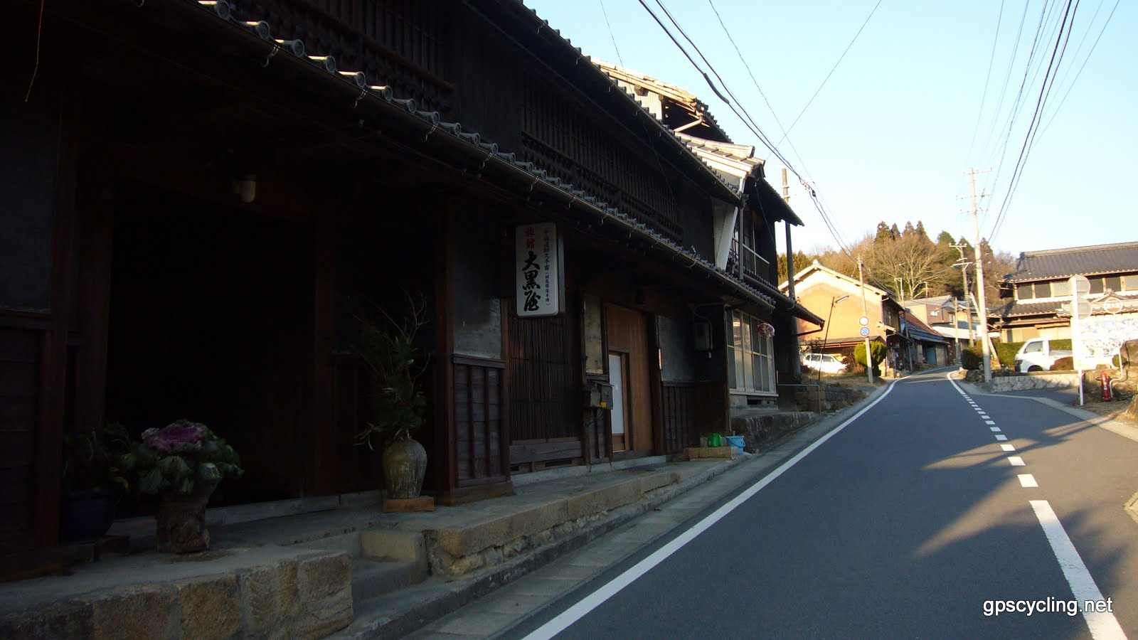 旧中山道